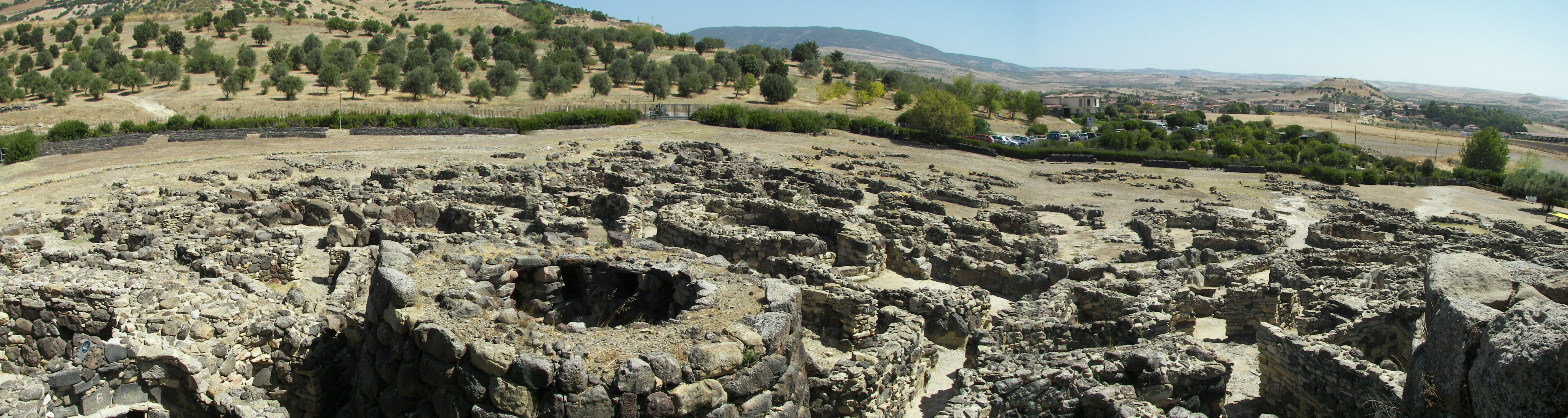 Nuraghe di Barumini